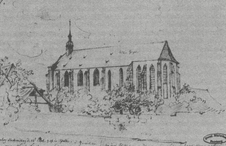 Bleistiftzeichnung der Abteikirche von Südosten